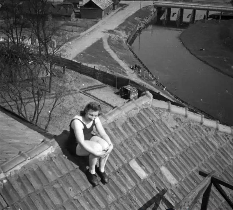 Беларуская (тарашкевіца): Менск (Miensk), рака Сьвіслач (Śvisłač) і Траецкая гара (Trajeckaja hara). Манастыр Сьвятой Тройцы